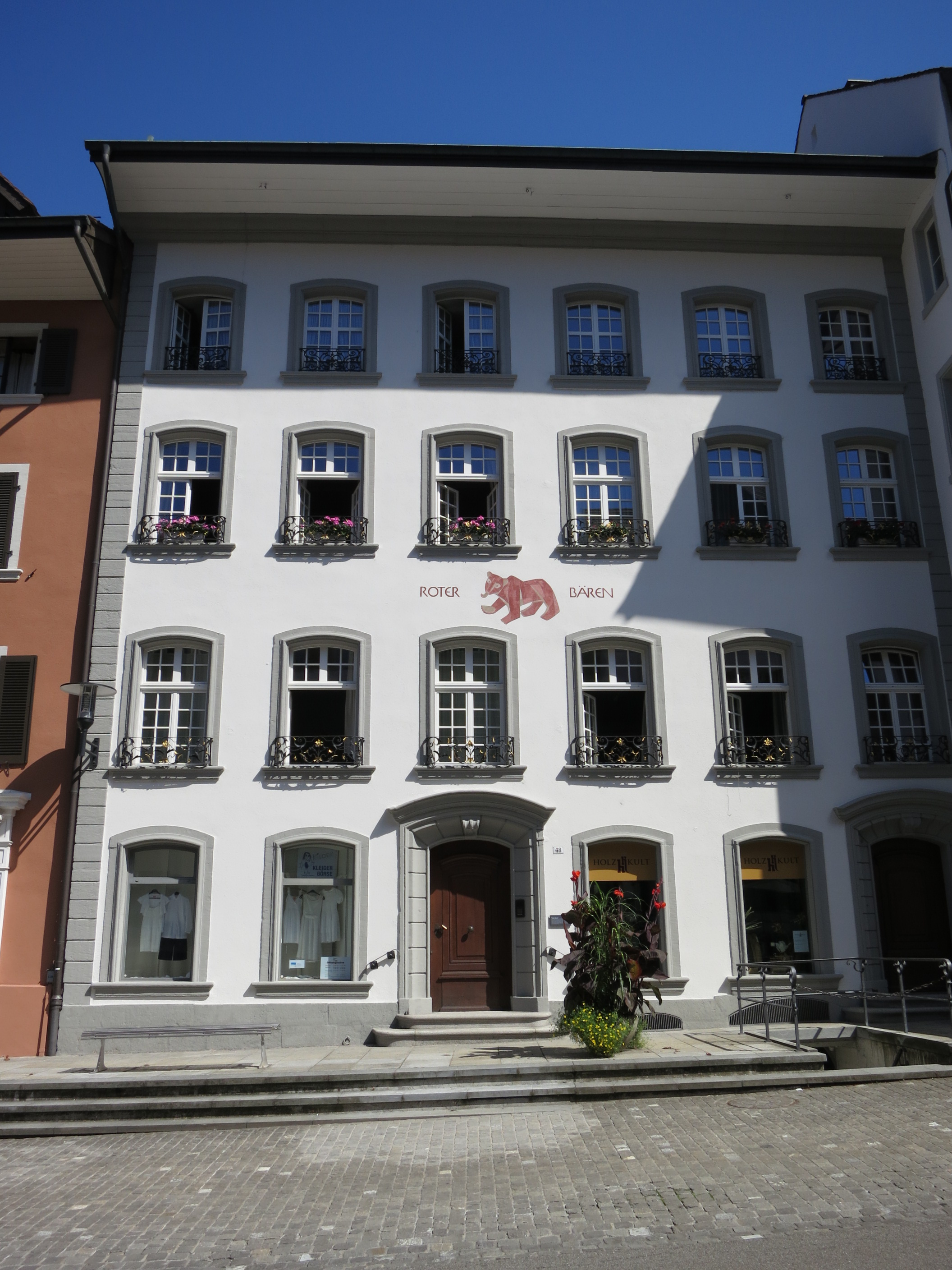 Zum Roten Bären, Brugg AG, Schweiz